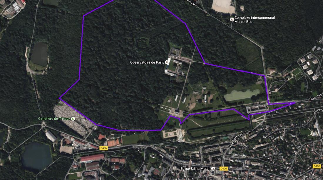 Schéma indiquant la zone inaccessible par le grand public, dépendant de l'Observatoire de Paris.